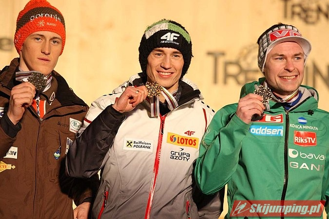 Dekoracja medalowa konkursu indywidualnego mężczyzn na skoczni K-120